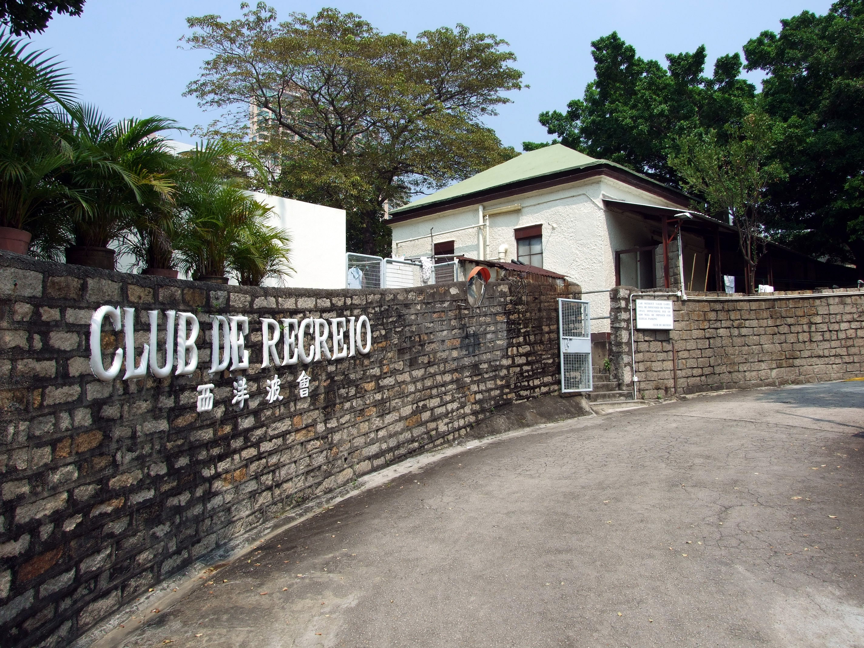 中文（香港）: 西洋波會